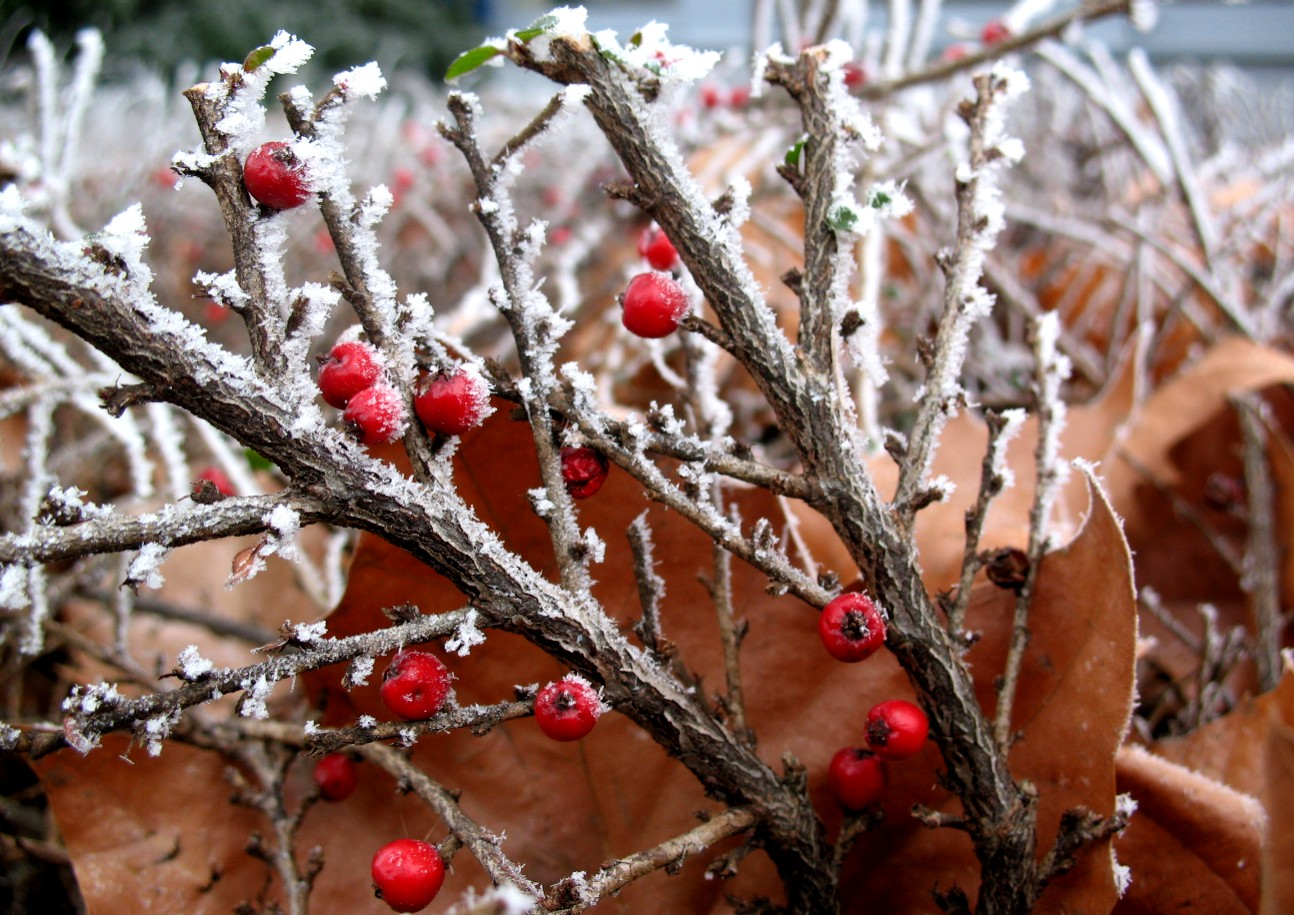 גבישי כפור על שיח גינה רישיון נוצר על ידי משתמש:שנילי